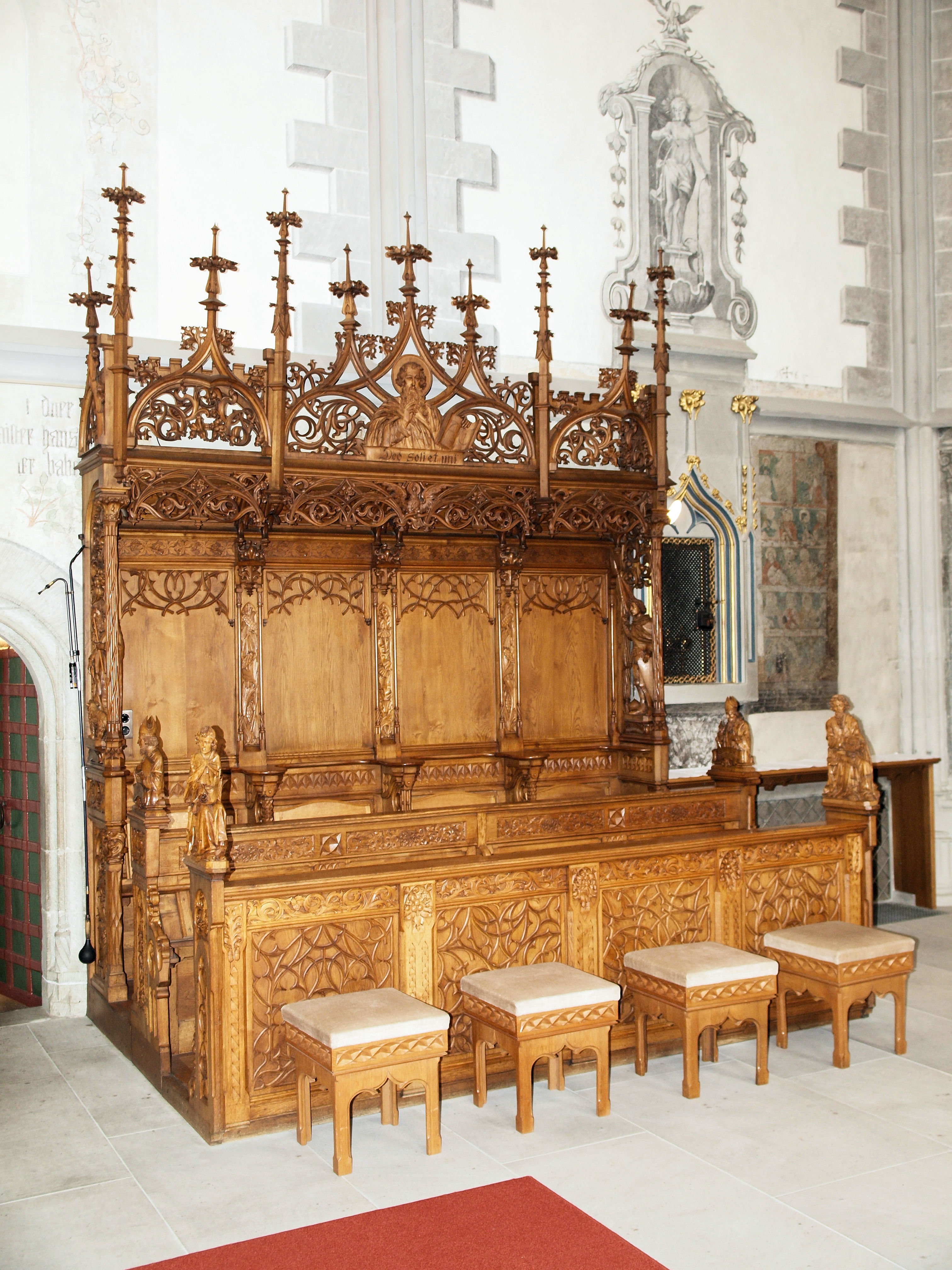 Das nordöstliche Chorgestühl der röm.-kath. Pfarrkirche St. Martin in Appenzell